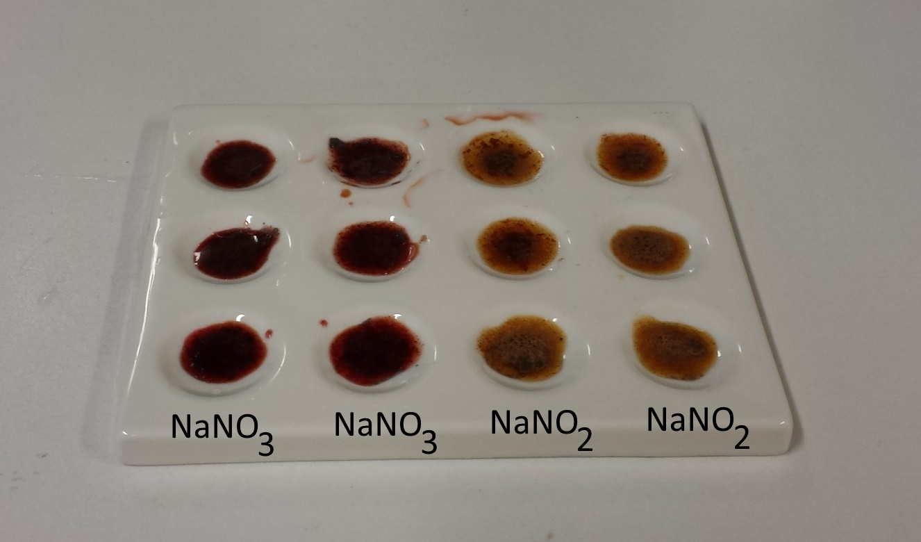 Lunges-Reagent and NaNO3, NaNO2